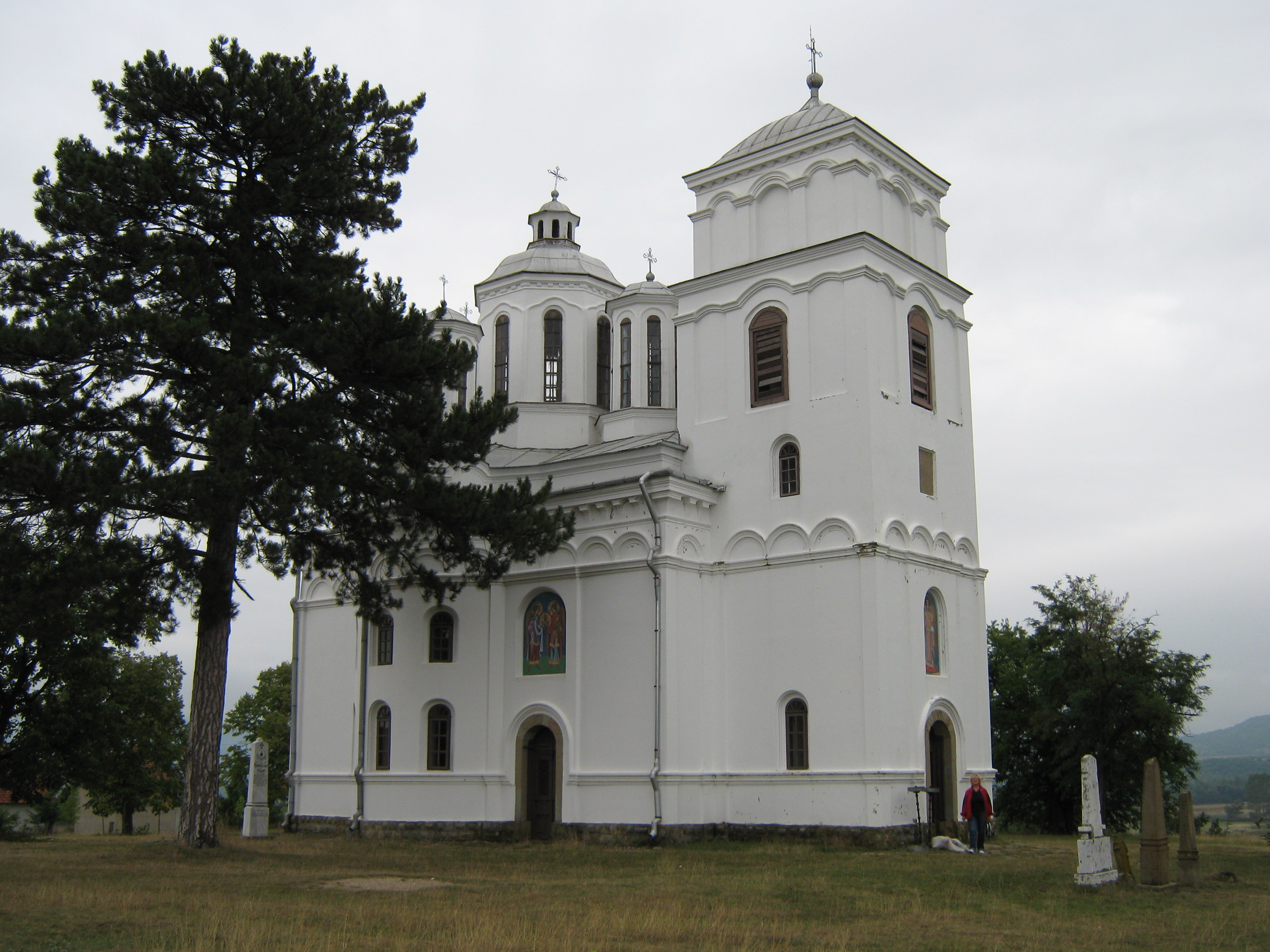 Crkva u Kondželju